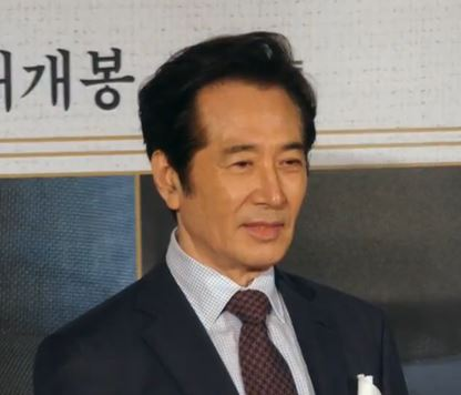 8월 13일 오후 서울시 동대문구 메가박스 동대문에서 영화 '명당' 제작보고회가 열려 박희곤 감독, 조승우, 지성, 백윤식, 김성균, 문채원, 유재명, 이원근 배우가 참석해 포토토임을 진행했다.